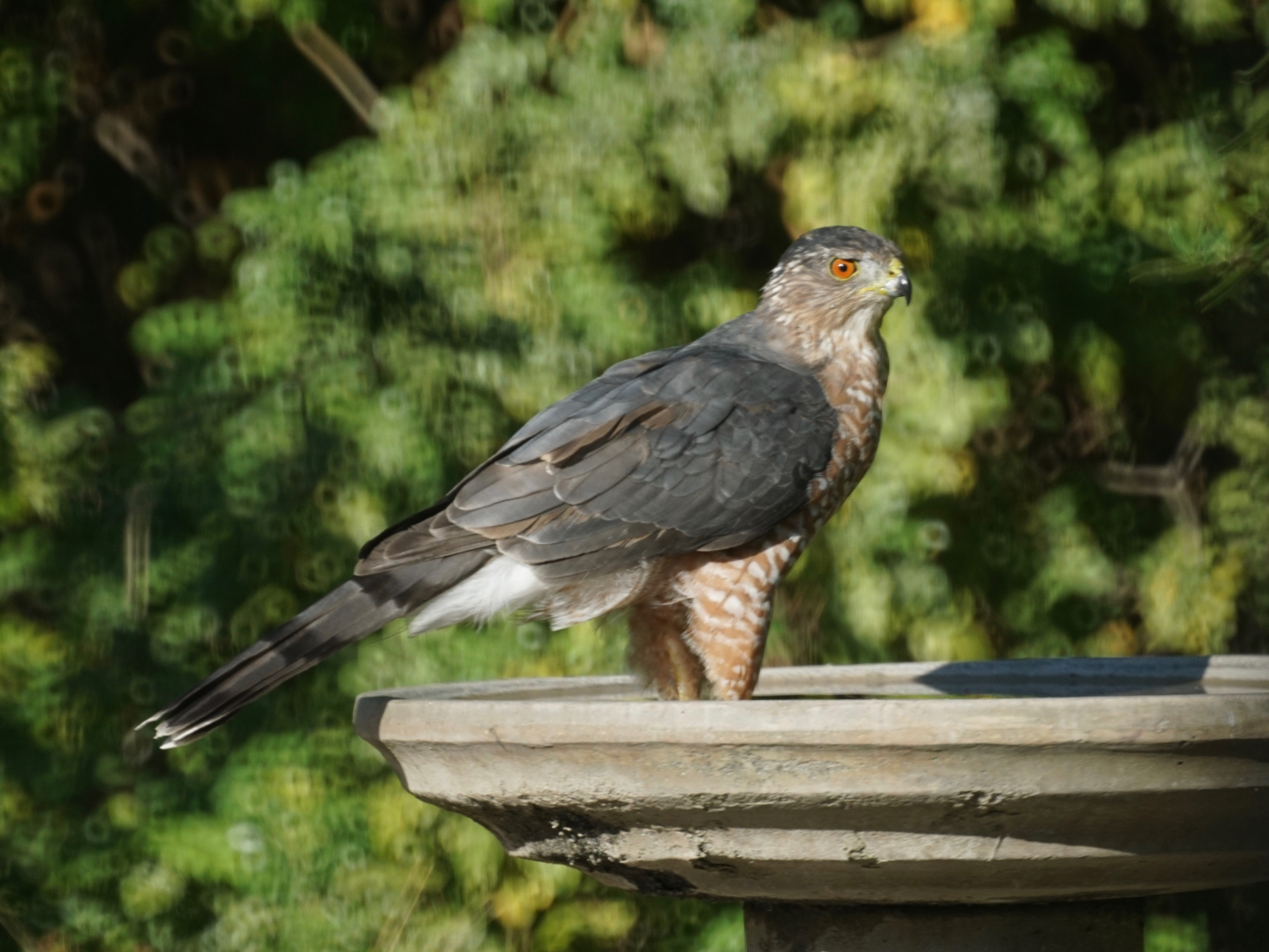 Hawk